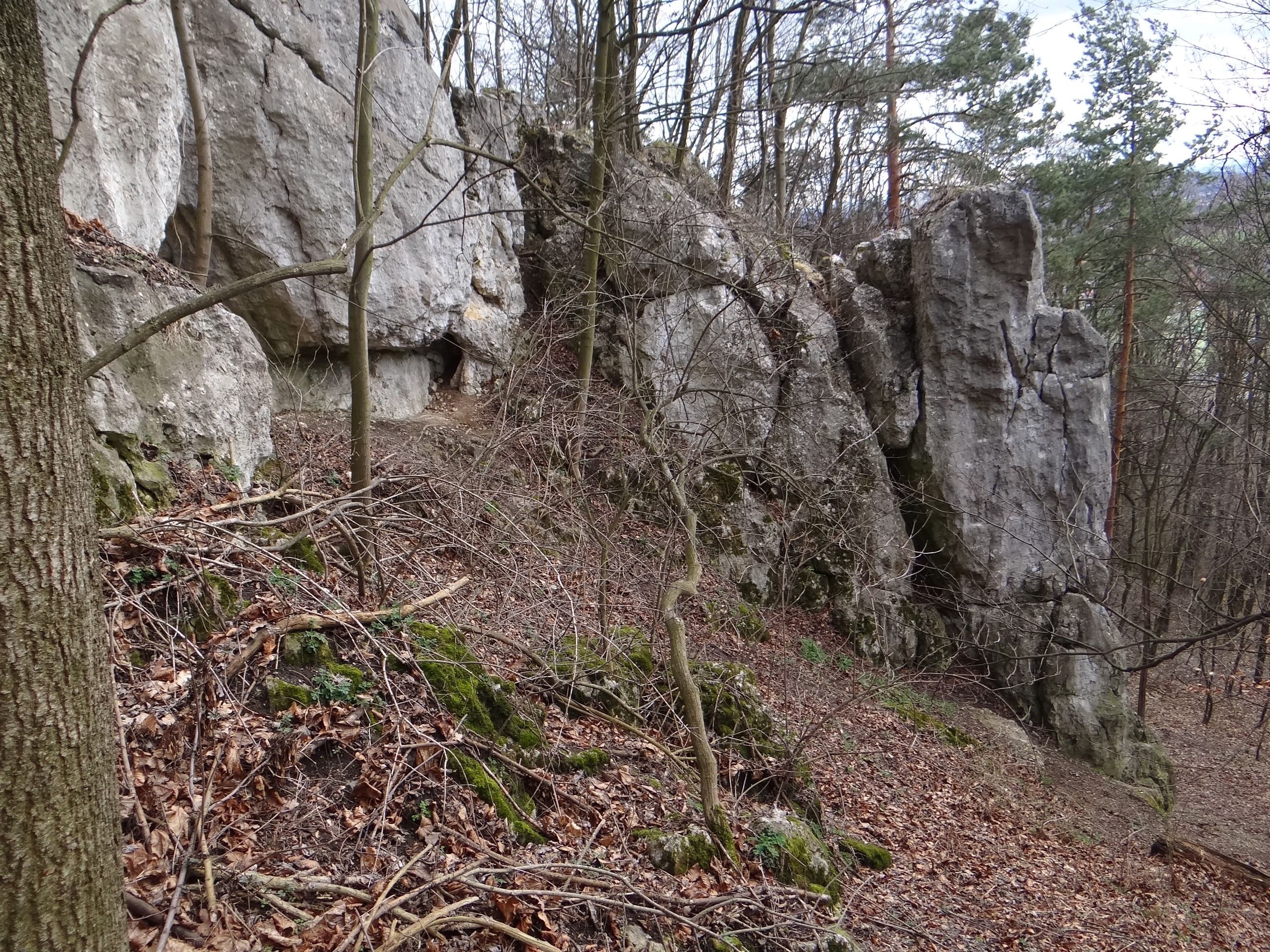 Karniowskie Skały